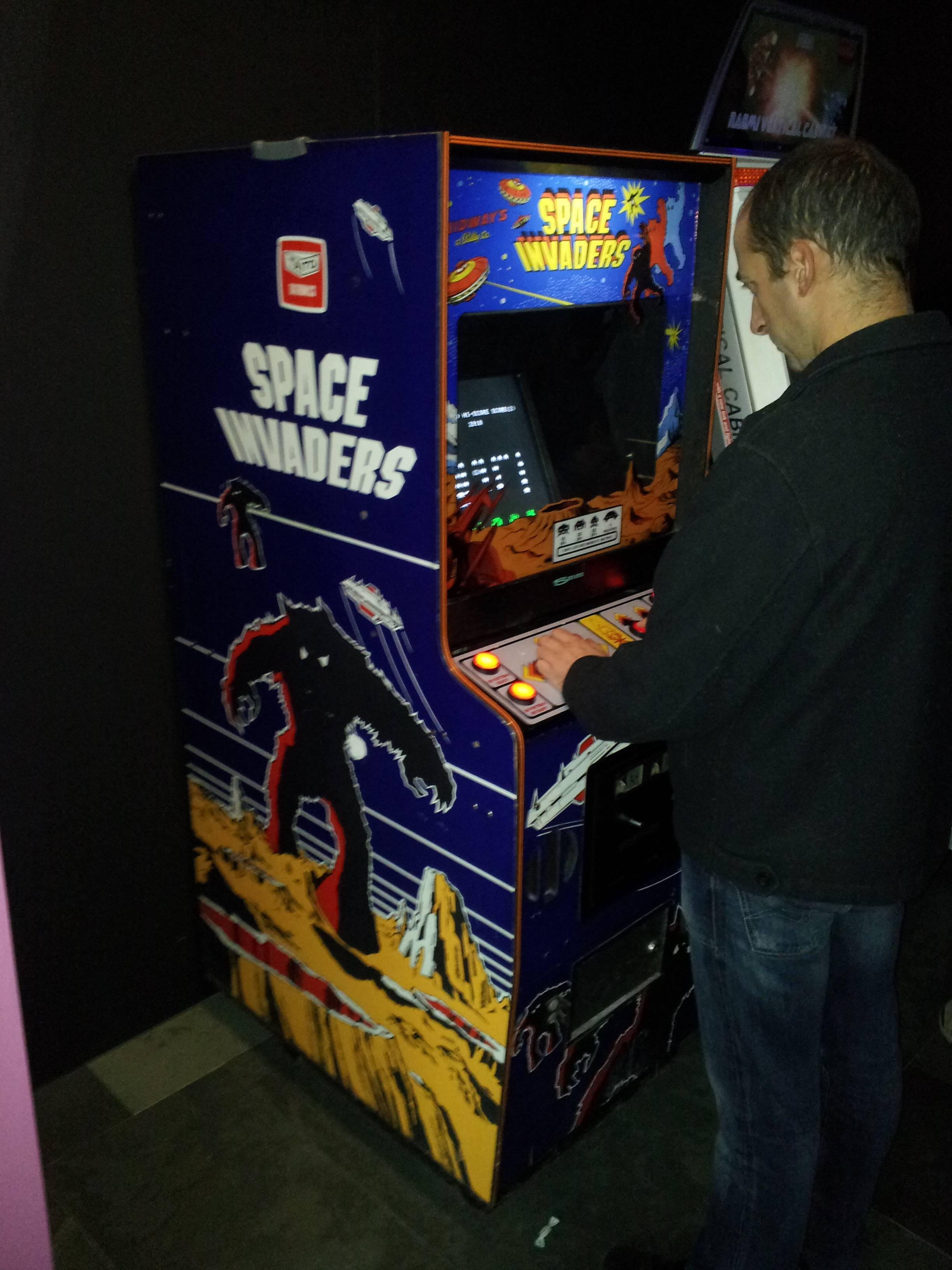 Màquina arcade d'Space Inavders de Midway.